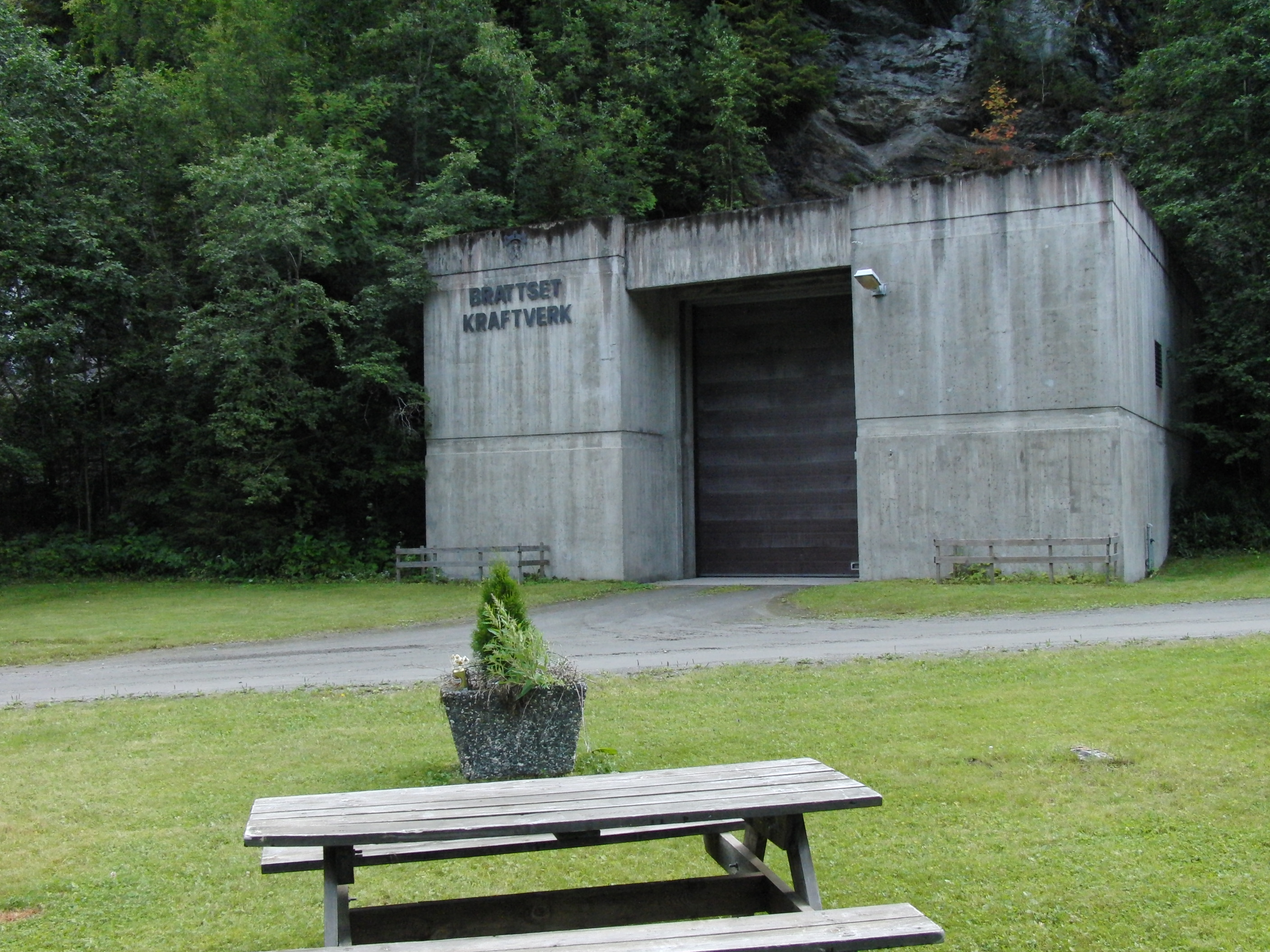 Brattset kraftverk